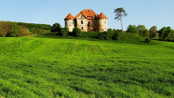 Castelul Pekri